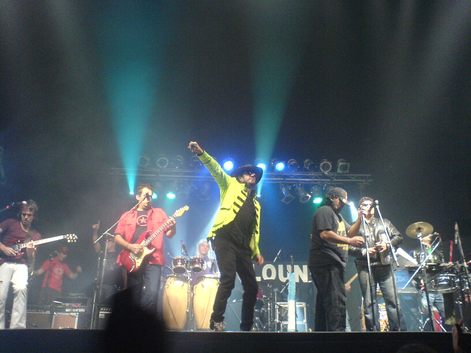 Los Autenticos Decadentes tocado en VOODOO Córdoba el 29/05/2010